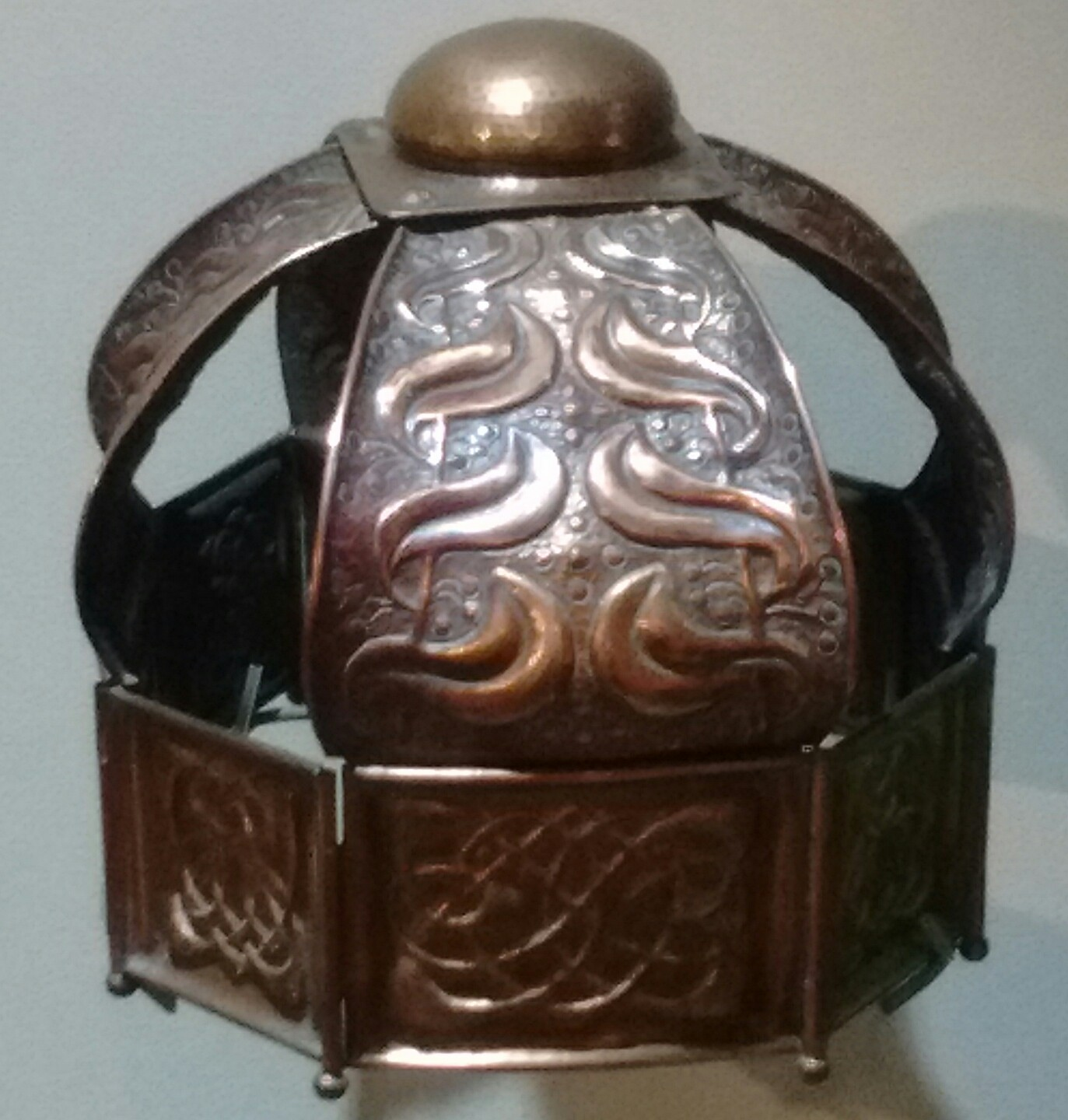 Coron a enillwyd gan R Silyn Roberts am ei waith Trystan ac Esyllt yn Eisteddfod Genedlaethol Bangor ym 1902.